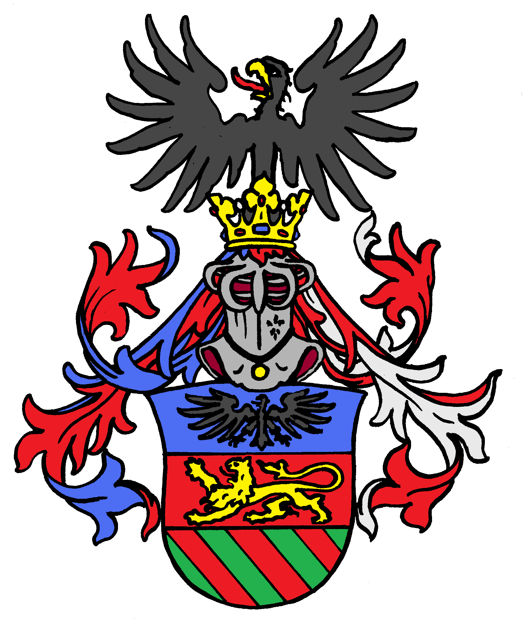 Wappen derer von Wendhausen, braunschweigisches Adelsgeschlecht